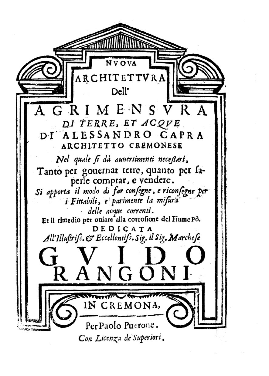 Frontespizio